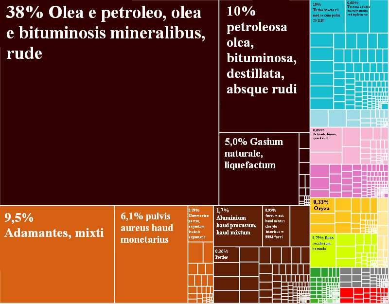 Emiratuensium exportationum graphicus Latine